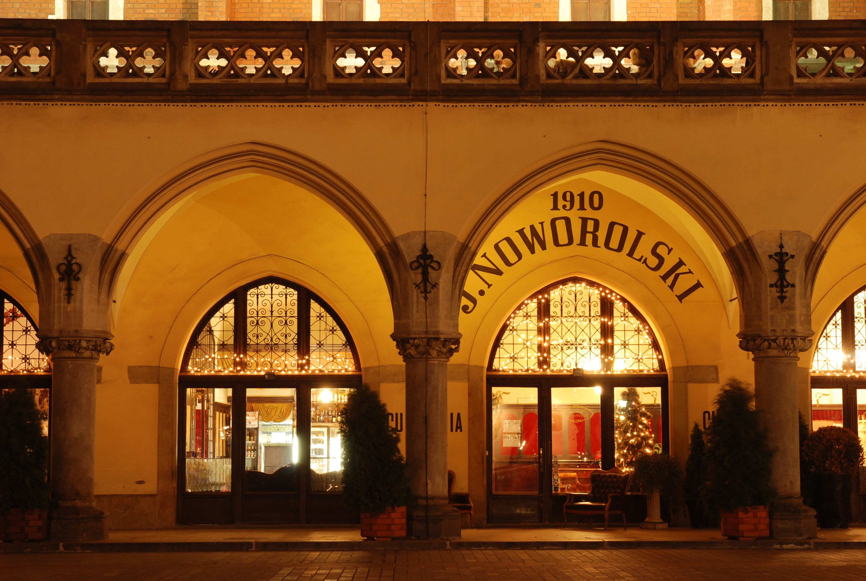 Kawiarnia Noworolski w Sukiennicach nocą. Kraków